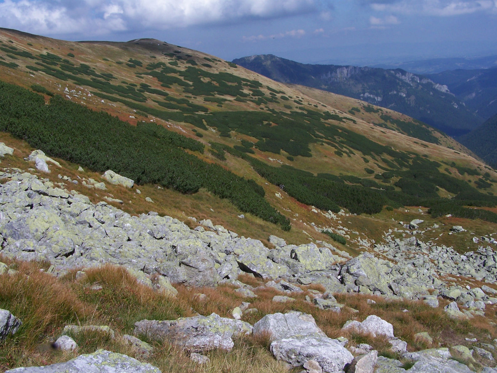 Długi Upłaz (Tatry Zachodnie)